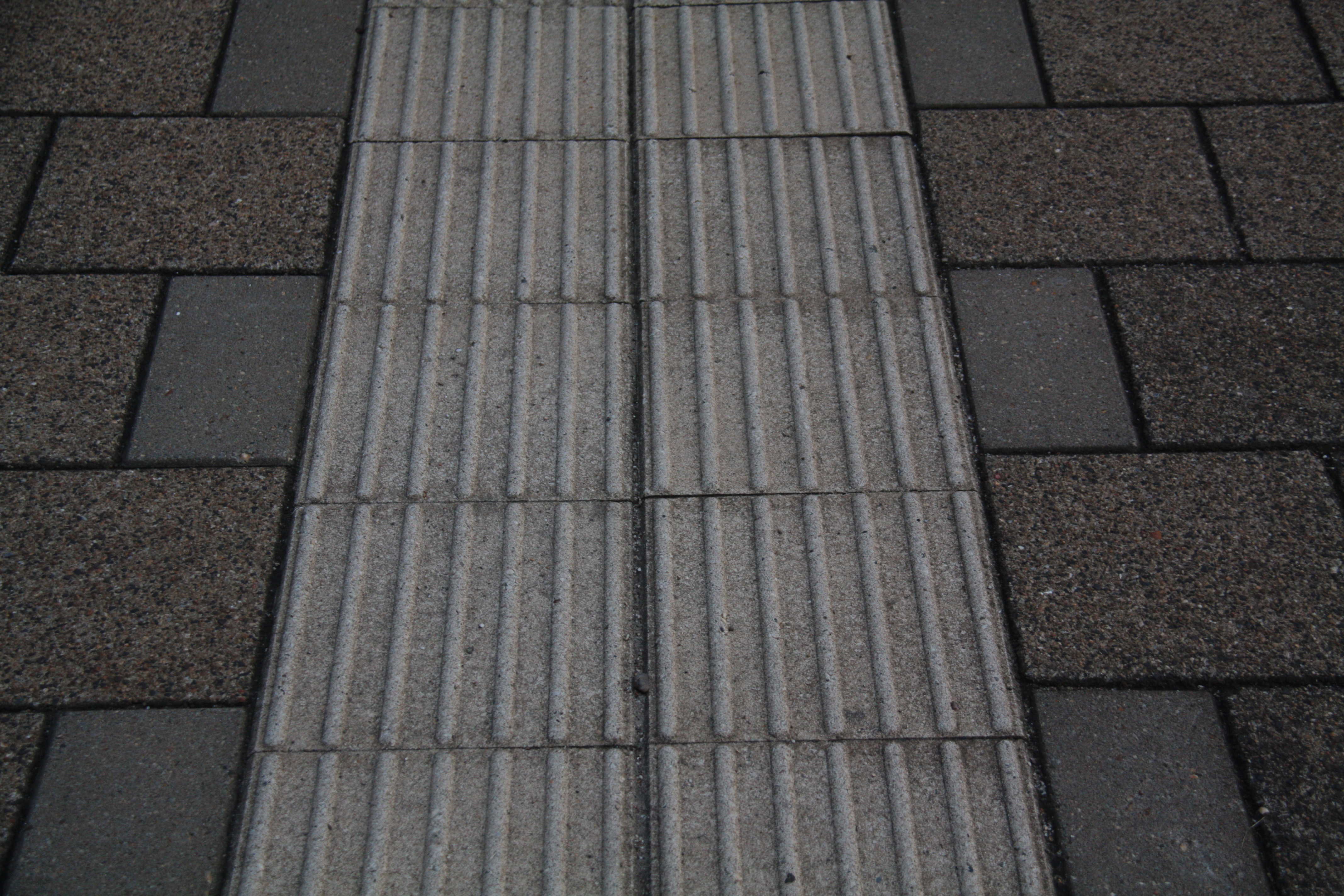 Blindengeleidestrook